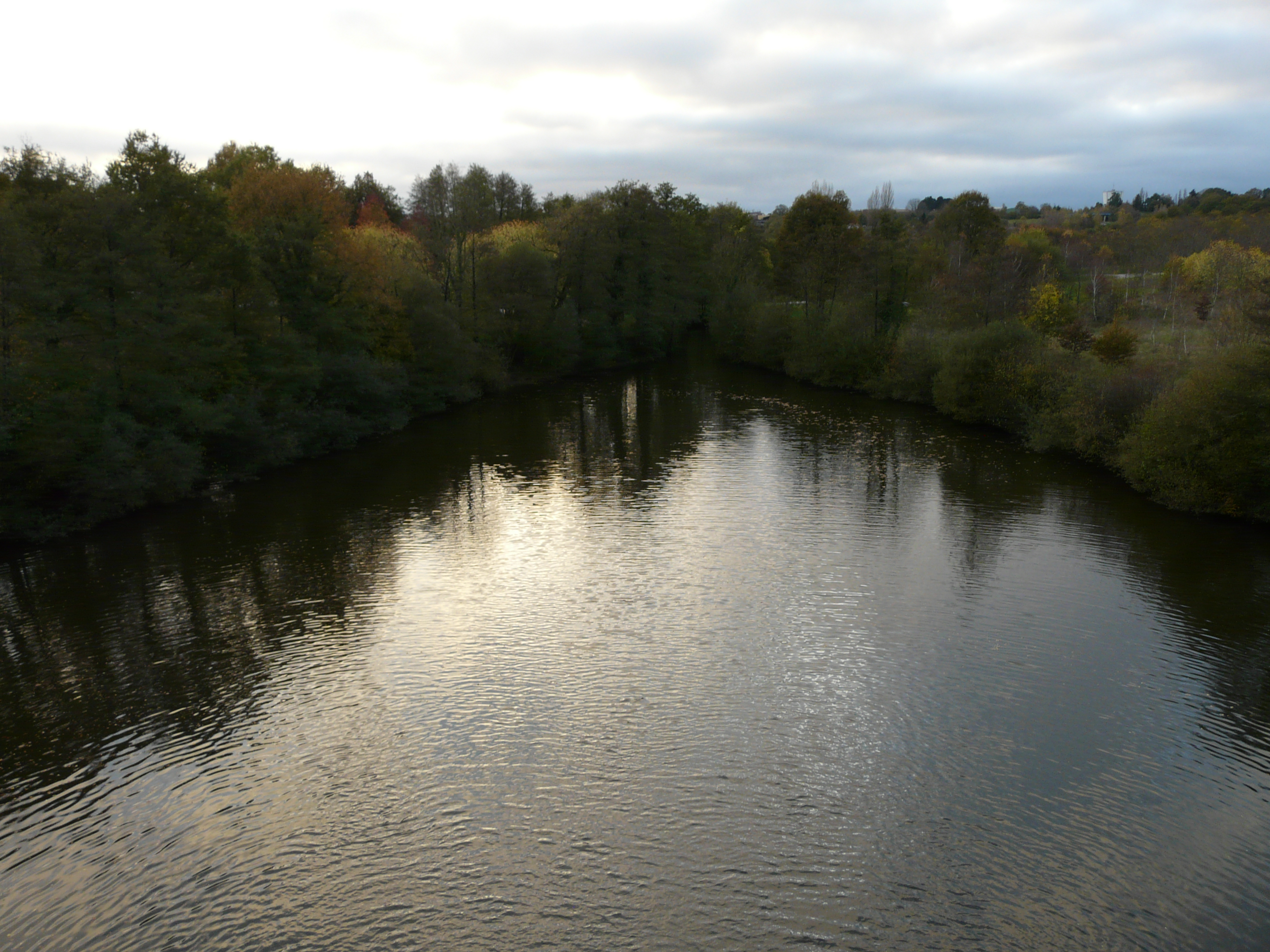 L'Yon en aval du barrage de Moulin Papon, La Roche-sur-Yon,Vendée, France. Vue prise depuis le barrage.